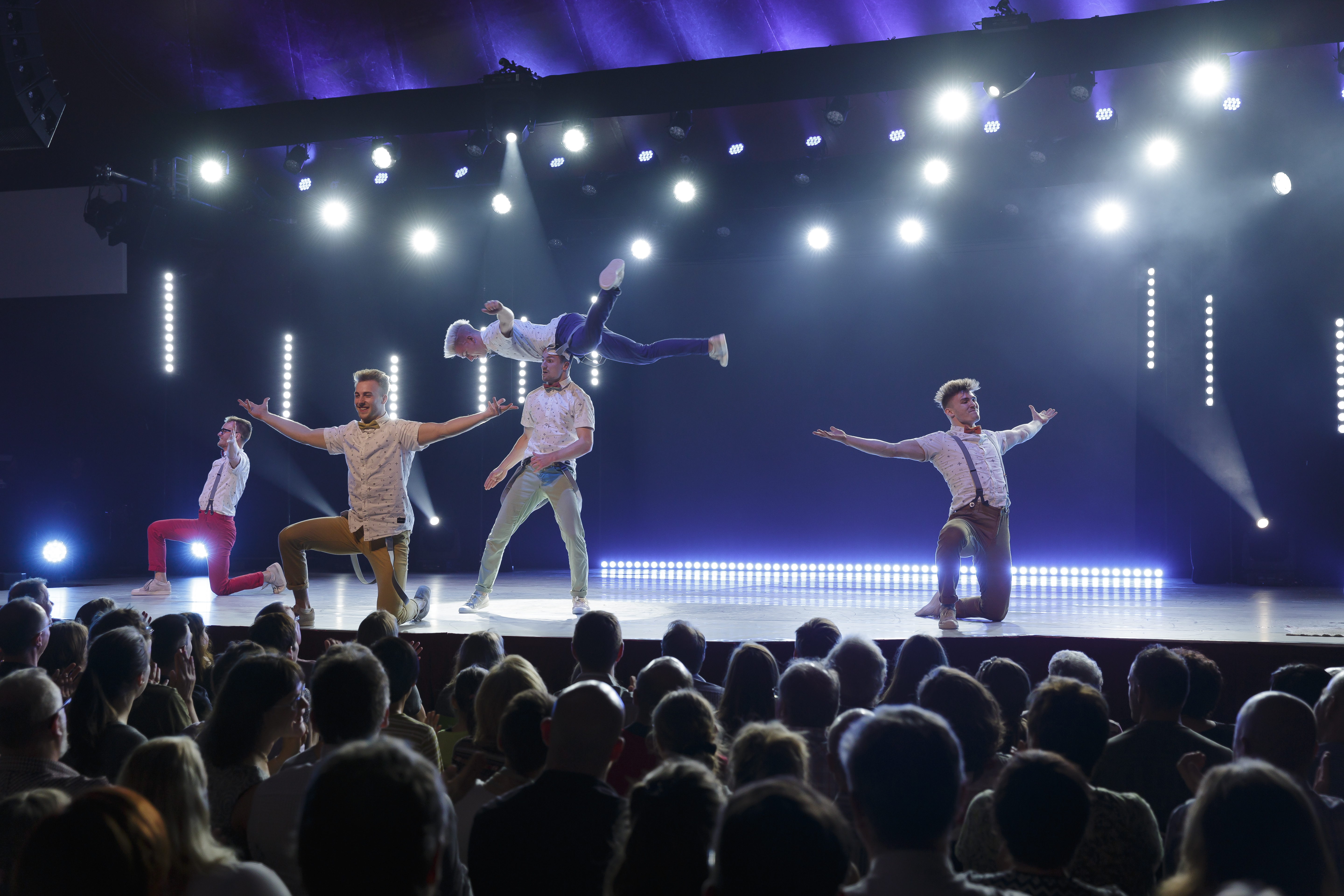 DDC mit Swinging Breakdance